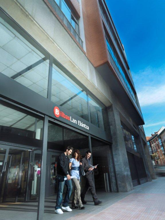 Oficinas Centrales de Lan Ekintza Bilbao